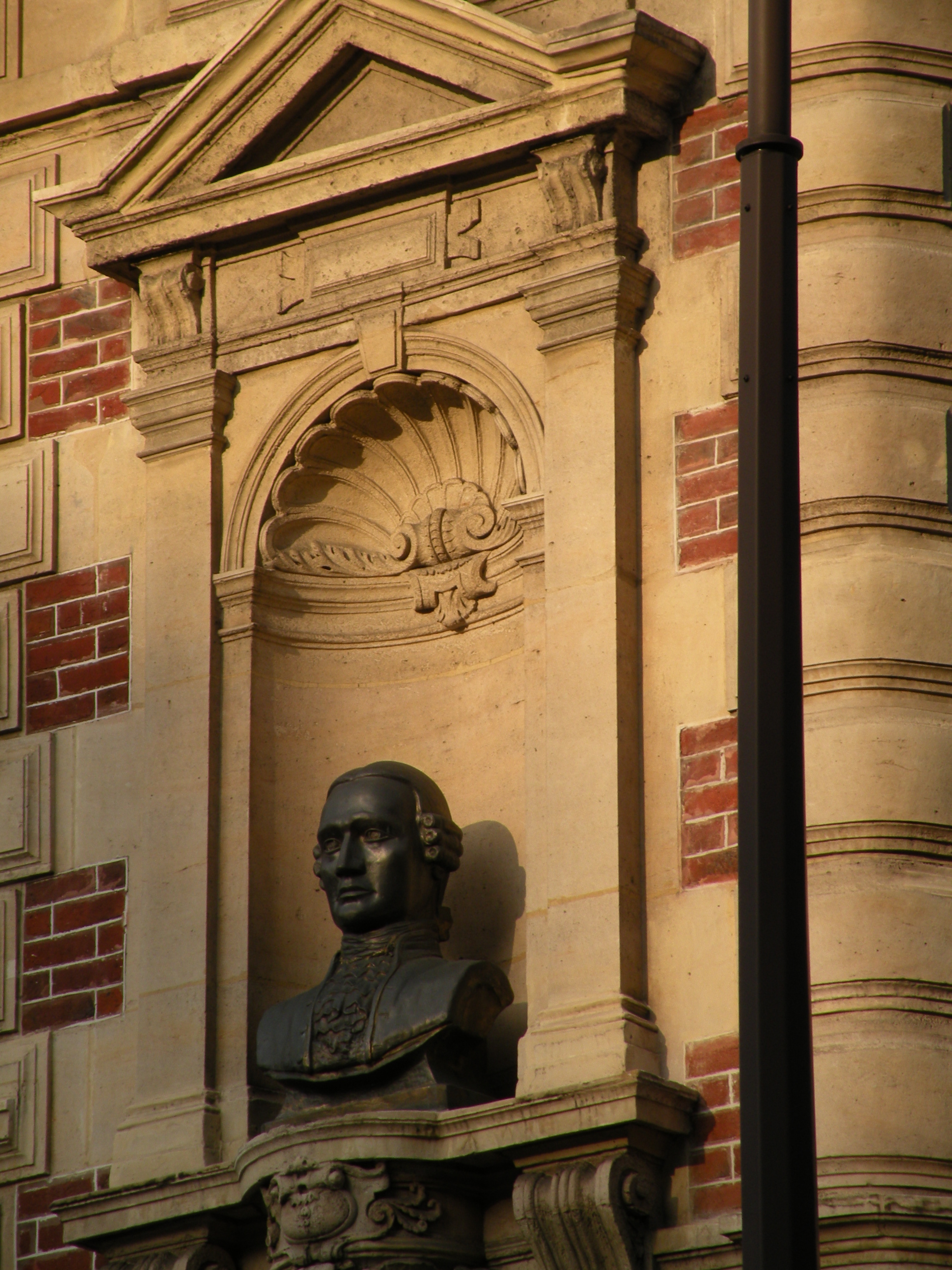 Buste de Pedro Vicente Maldonado, 53 boulevard de Courcelles et place de la République d'Équateur à Paris VIIIe.